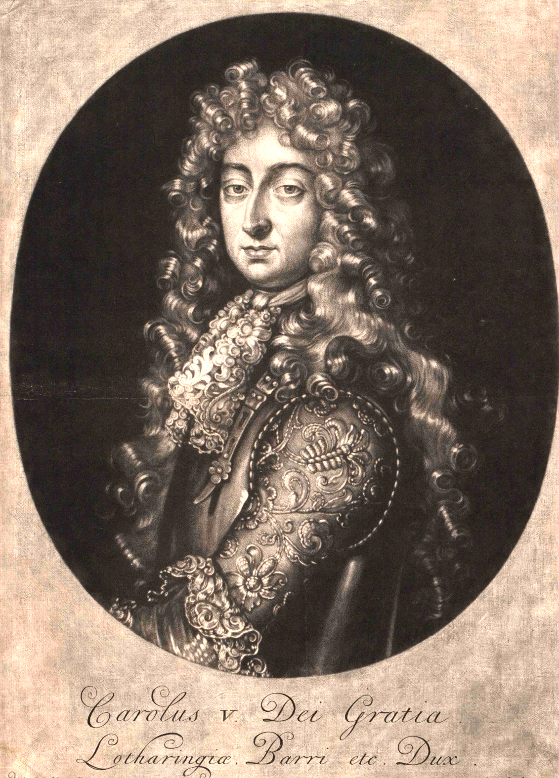 Charles V (Léopold) duc de Lorraine (1643–1690), duc titulaire de Lorraine et de Bar de 1675, maréchal de l'armée impériale germaine-romaine aux guerres contre le ottomans, vainqueur de Vienne 1683, et de Buda 1686, beau-frére de Léopold Ier du Saint-Empire, mari de l'Archiduchesse Eléonore d'Autriche